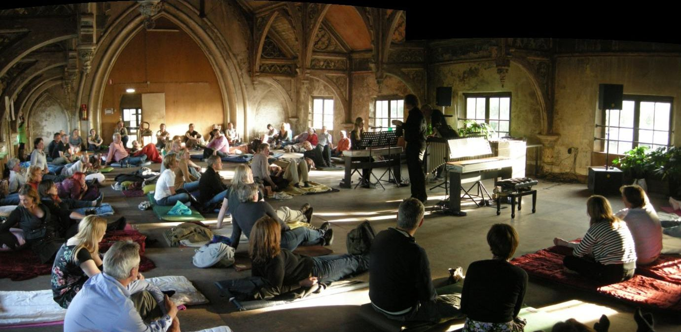 Ligconcert door Jeroen en Sandra van Veen op elektrische piano en Peter Elbertse op marimba, gegeven op 2 juni 2012 in de Metaal Katedraal in De Meern (NL)